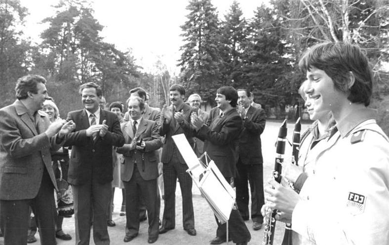 ADN-ZB-Sindermann-25.4.82-hko-Berlin: DKP-Delegation- Die DKP-Delegation unter Leitung von Herbert Mies hatte am Sonntagabend in Prieros eine herzliche Begegnung mit dem Sekretariat des Zentralrates der FDJ, an seiner Spitze der 1. Sekretär des Zentralrates der FDJ, Egon Krenz (l.), Kandidat des Politbüros des ZK der SED, Singeklubs der FDJ stellten während des Treffens alte und neue Lieder der Singebewegung vor, die vom Friedenswillen und den Leistungen der Jugend der DDR beim Aufbau des Sozialismus künden. 1. Reihe 5.v.l. Hartmut König